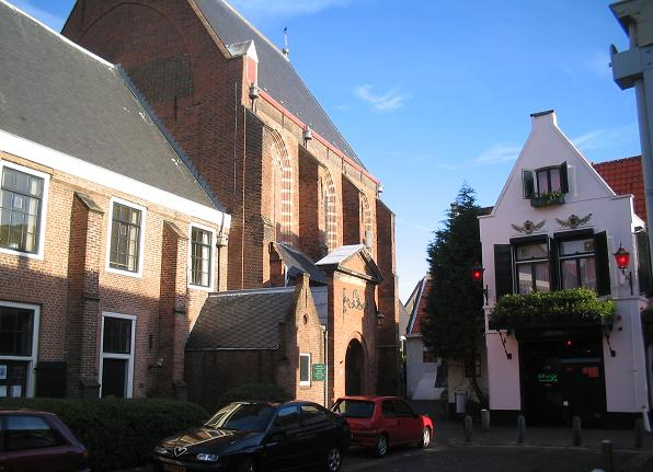 'rosse buurt' in Haarlem , begijnhof buurt categorie:afbeelding Haarlem